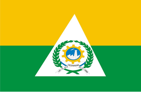 Bandeira do município goiano Cezarina